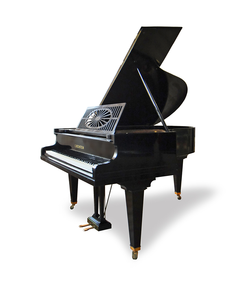 Кабинетный рояль C.Bechstein. Модель в стиле ар-деко образца 1930 года